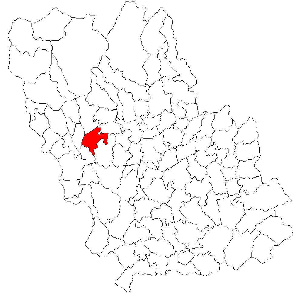 Categorie:Hărţi ale judeţului Prahova